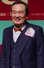 5일 오전 서울특별시 강남구 압구정 CGV에서 배우 박인환, 신구, 임현식, 윤덕용, 김인권이 참석한 가운데 영화 '비밥바룰라' (이성재 감독)의 제작보고회가 열렸다.